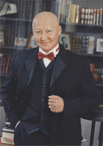 Ж. Назаралиев